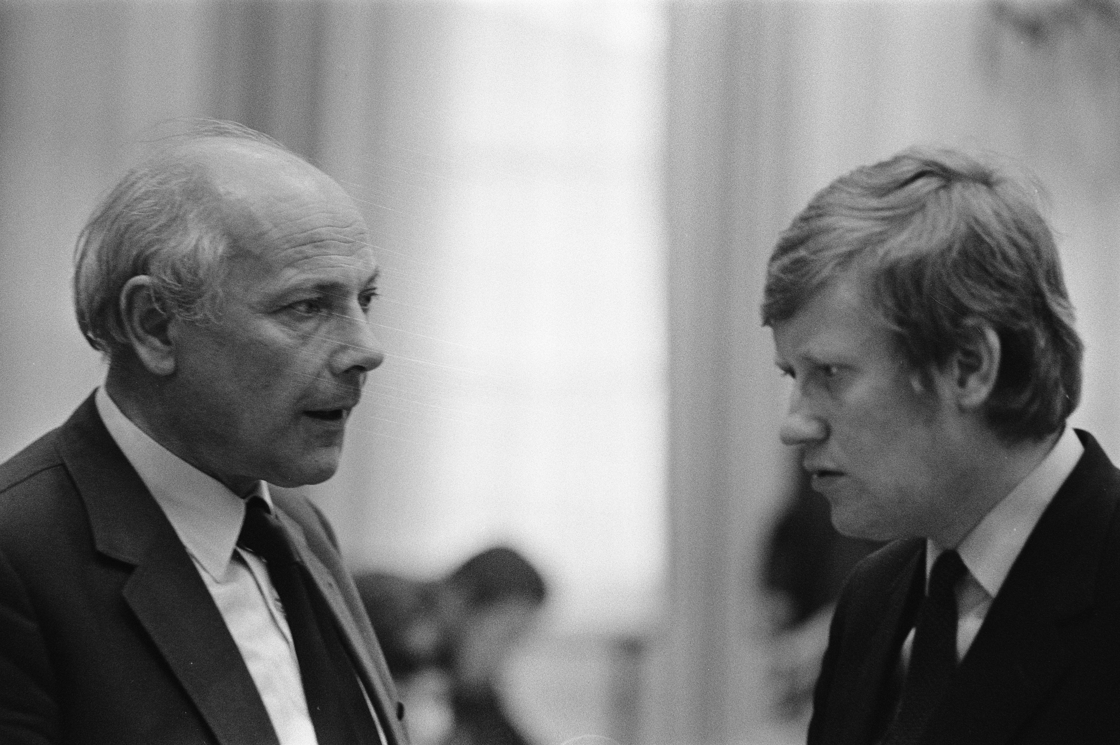 Collectie / Archief : Fotocollectie Anefo Reportage / Serie : Debat in Tweede Kamer over de Voorjaarsnota Beschrijving : Fractievoorzitters Joop den Uyl (links, PvdA) en Hans Wiegel (VVD) in gesprek Annotatie : randnegatiefstrooknummers: 34A, 35A Datum : 22 juni 1972 Locatie : Den Haag, Zuid-Holland Trefwoorden : parlementaire debatten, parlementariërs, politici, politieke partijen, voorzitters Persoonsnaam : Uyl, Joop den, Wiegel, Hans Fotograaf : Fotograaf Onbekend / Anefo, Peters, Hans / Anefo Auteursrechthebbende : Nationaal Archief Materiaalsoort : Negatief (zwart/wit) Nummer archiefinventaris : bekijk toegang 2.24.01.05 Bestanddeelnummer : 925-6856